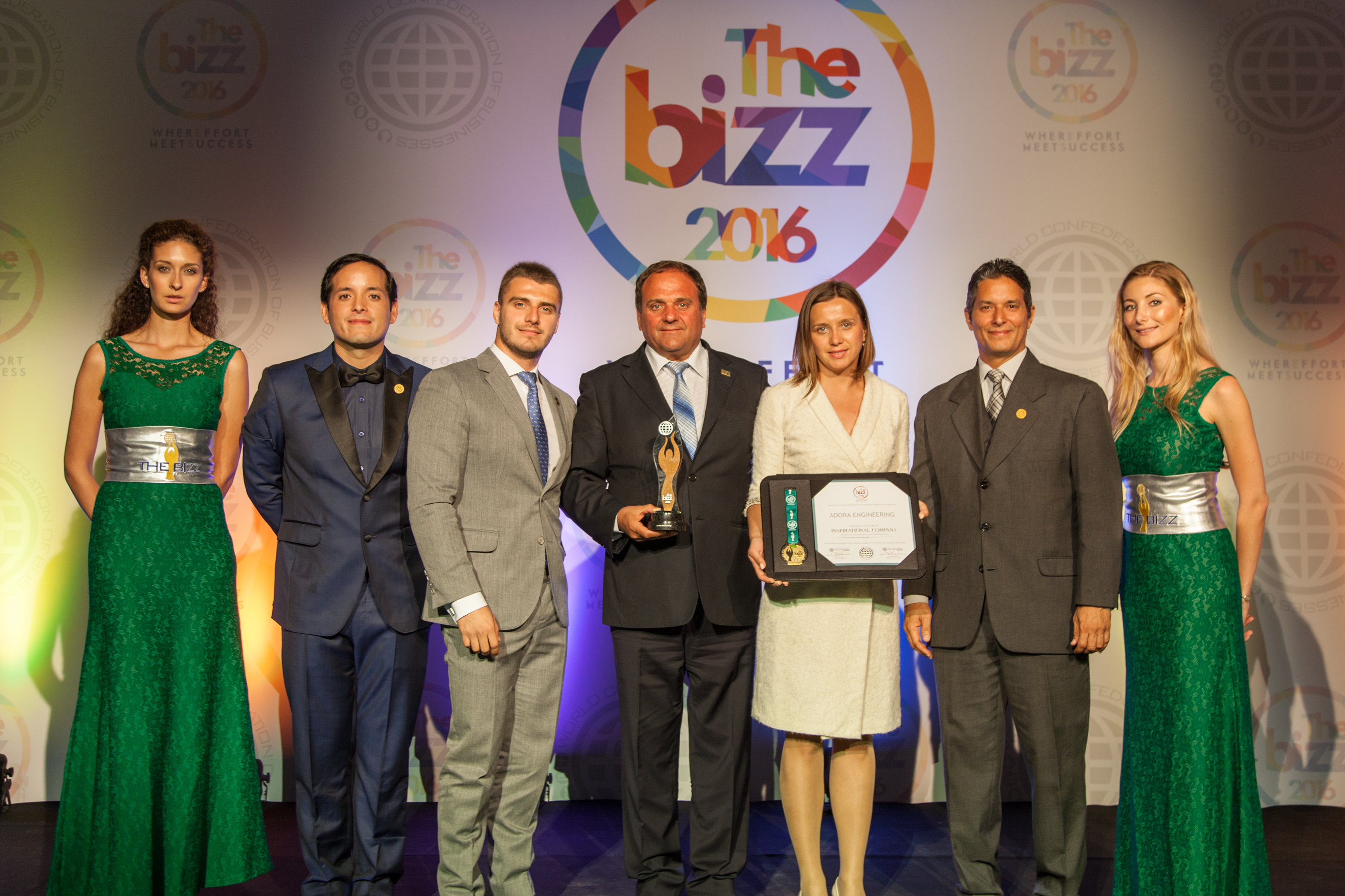 Награда „БИЗ“ од Светската маркетинг организација, Монте Карло, Монако, 2016